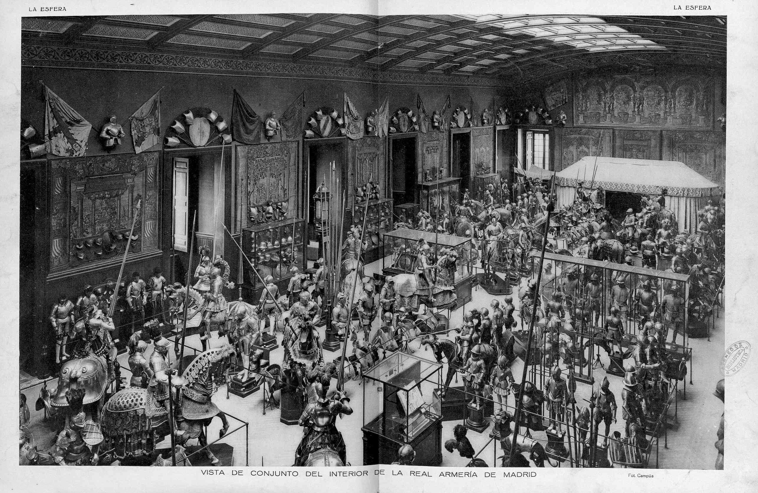 Vista de conjunto del interior de la Real Armería de Madrid.